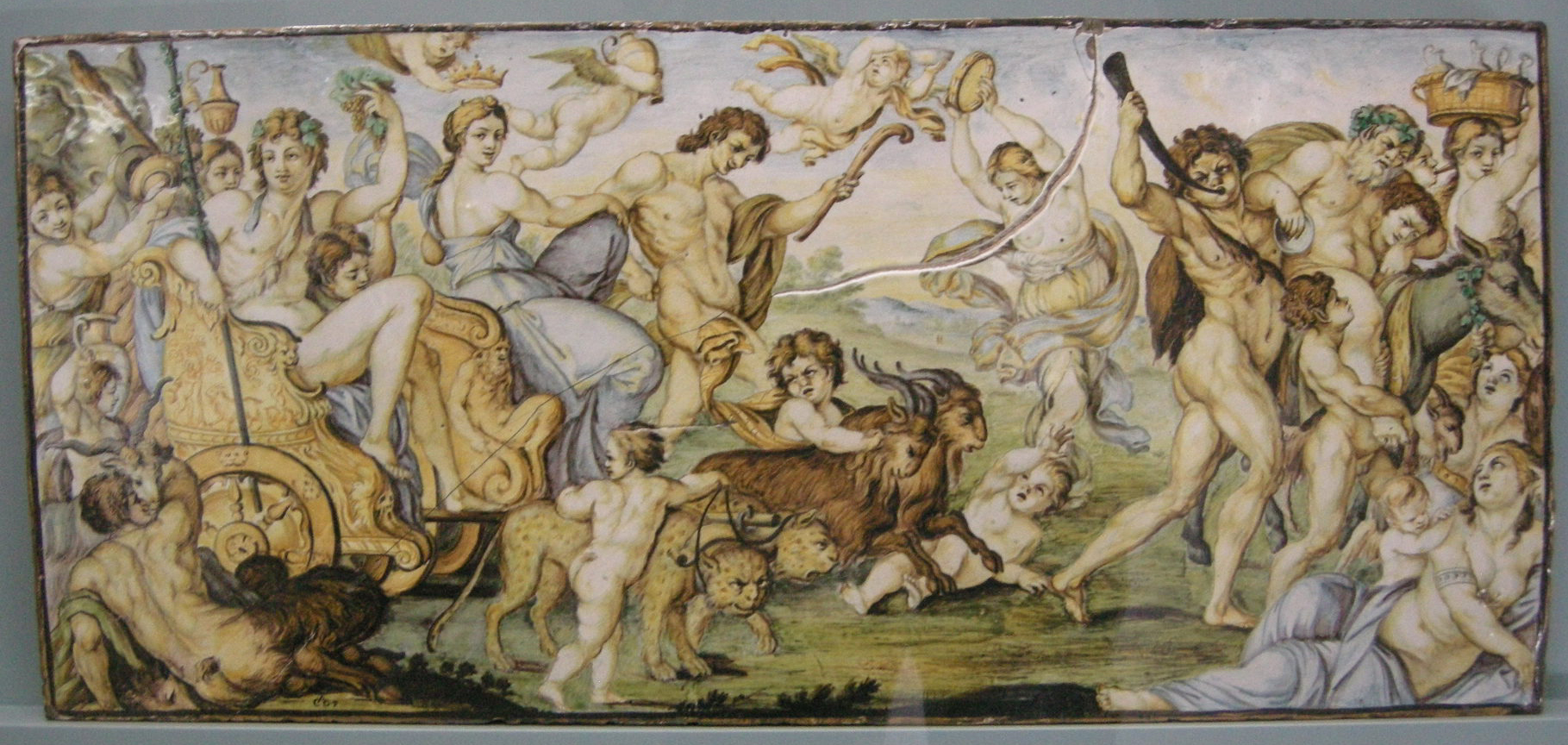 C.sf., castelli, carlo antonio grue, lastra con trionfo di bacco e arianna, 1685-1690